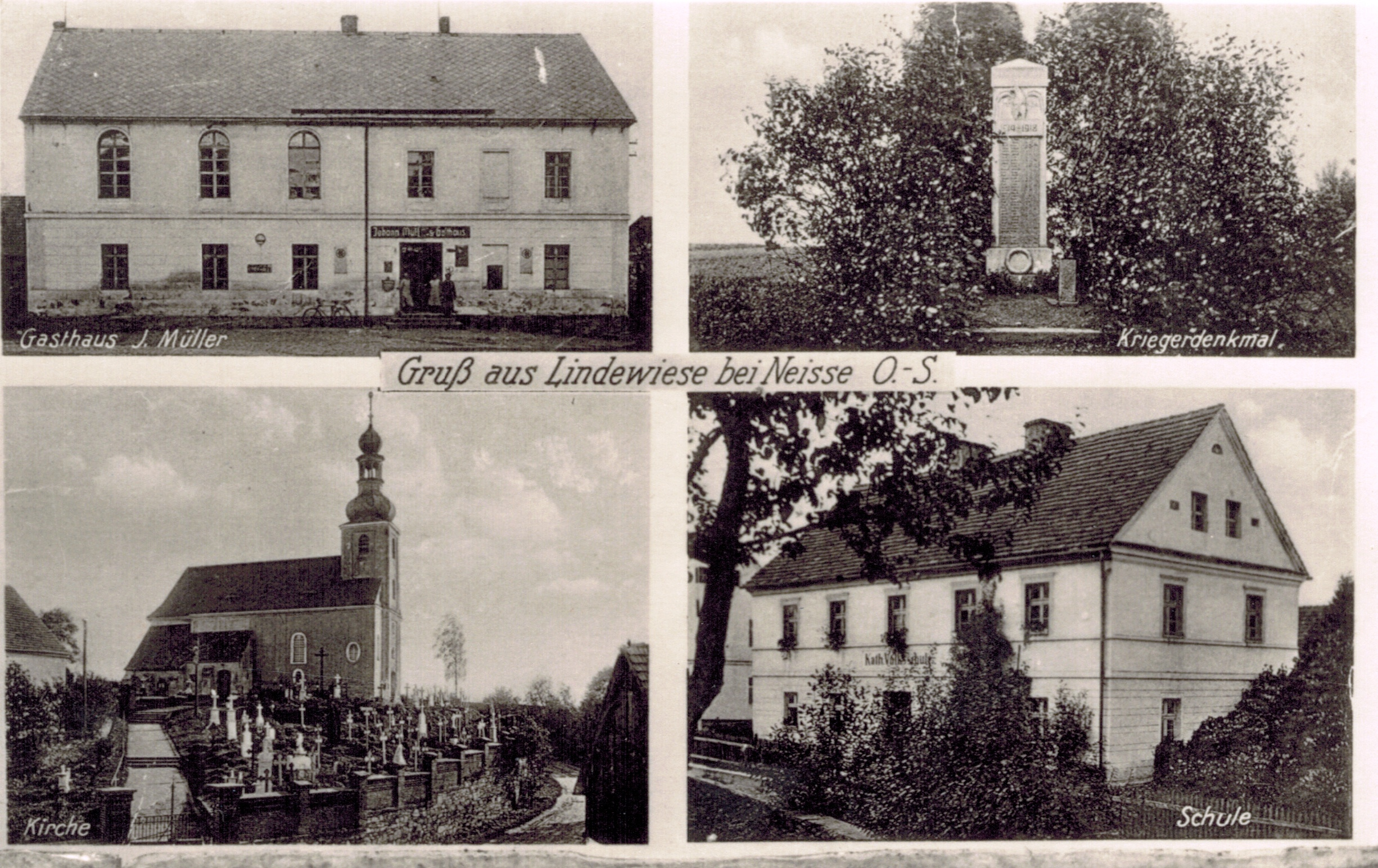 Lipowa - kościół pw. św. Katarzyny, szkoła wiejska, gospoda i pomnik poległych podczas I WŚ